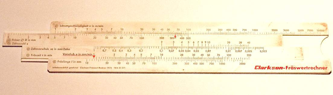 Rechenschieber zur Bestimmung der Arbeitsparameter einer Werkzeugmaschine